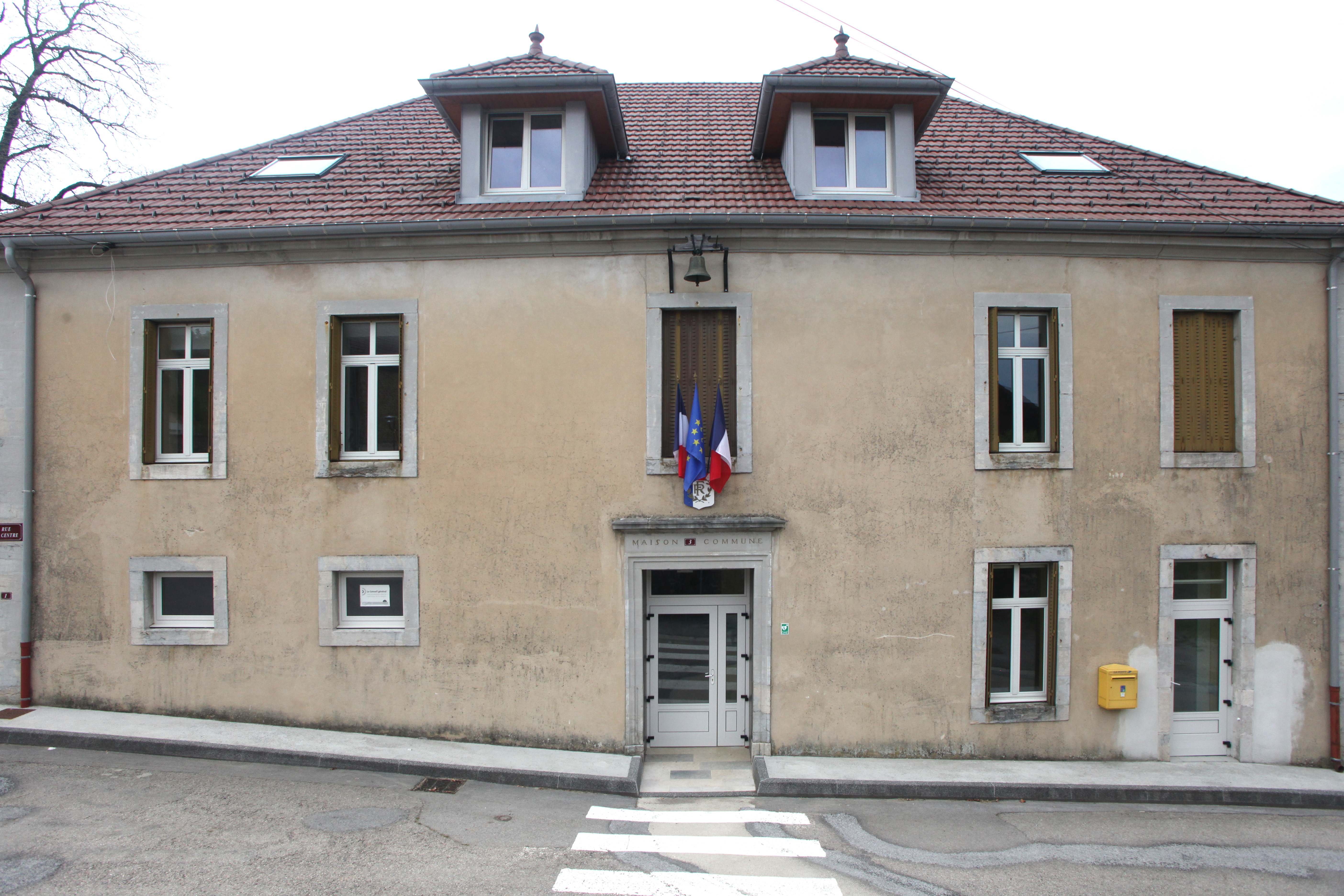 Mairie de Gevresin (Doubs).